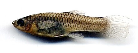 Poecilia caucana